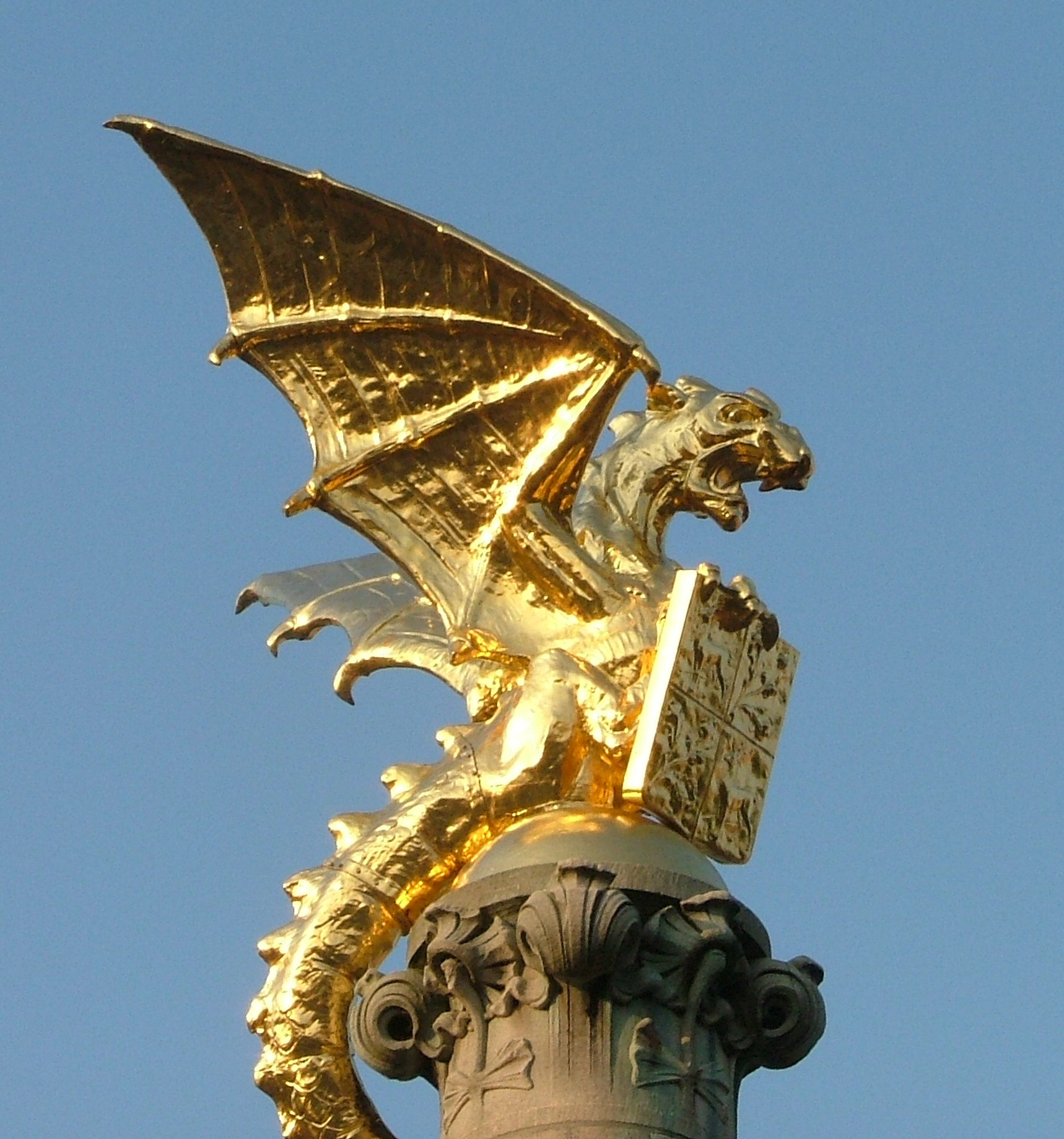 Detail van het Standbeeld De Draak op Stationsplein in Den Bosch. Eigen materiaal Geert Smulders, Rosmalen.